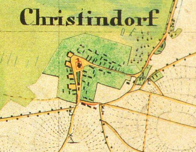 Christinendorf, Ortsteil der Stadt Trebbin, Lkr. Teltow-Fläming, Brandenburg, Deutschland, Urmesstischblatt von 1840